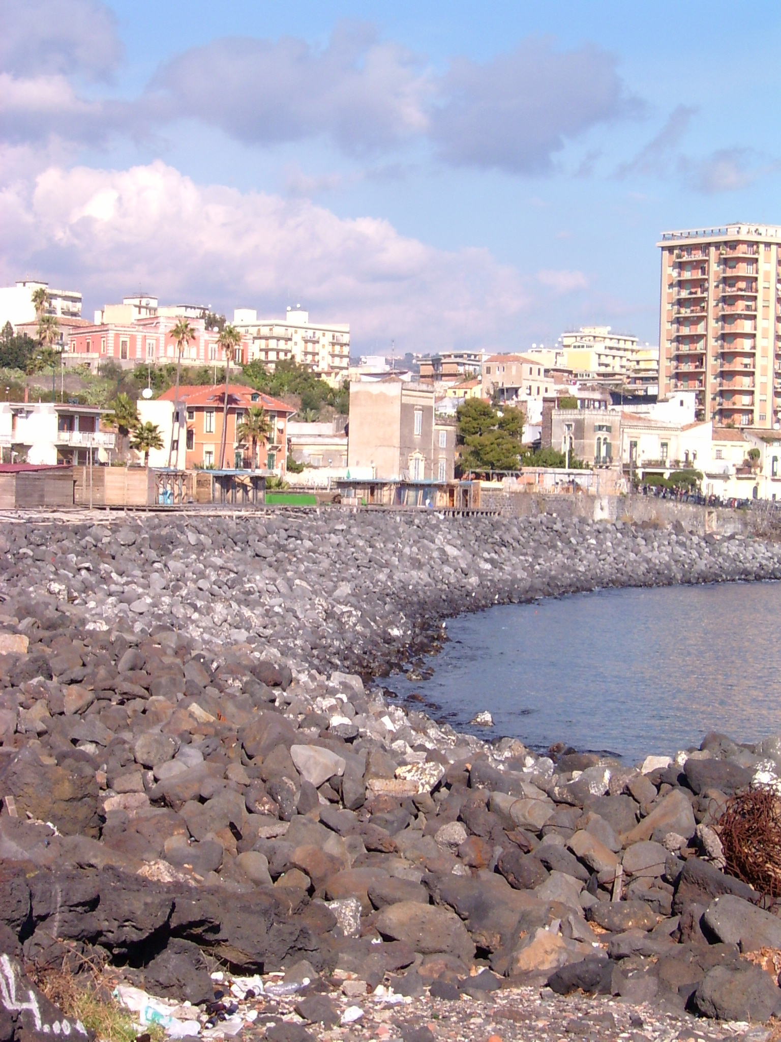 San Giovanni li Cuti visto da sud. Veduta di San Giovanni li Cuti.Catania_1